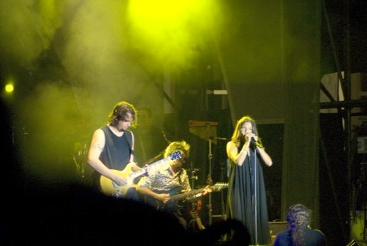 La Quinta Estación en vivo